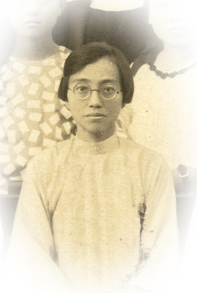 臺灣最早的女醫生蔡阿信女士（1899年─1990年3月5日）（第一排中右）與其教授的助產士學員合影，一九三四年攝於她在臺中開設的清信醫院正門。